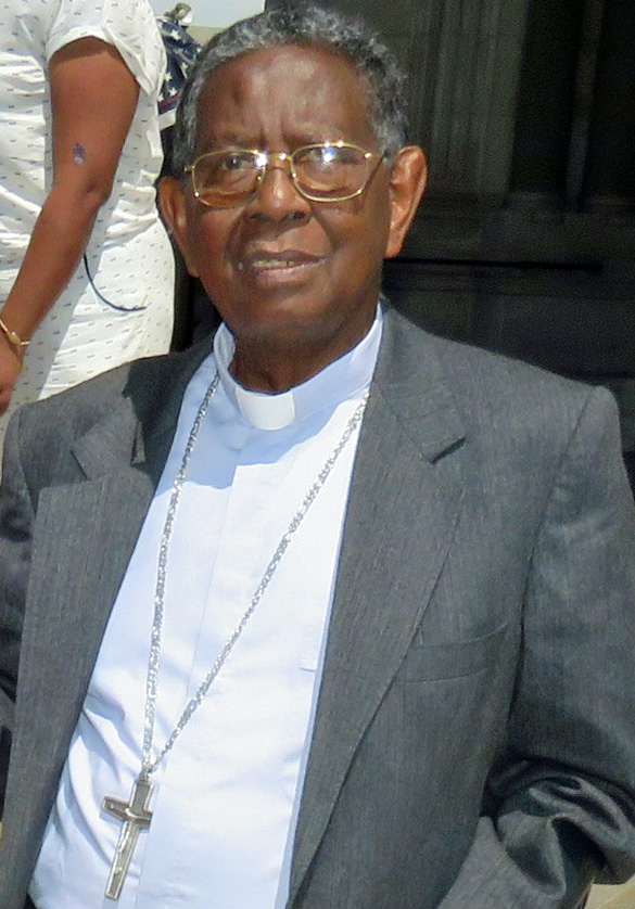 Célébration de la messe pour la clôture du du "zaikabe 06". à la basilique Notre-Dame de la Garde (Marseille). Et le passage à l'entrée de la "porte sainte" pour l'année de la miséricorde. Malagasy: Fandalovan'i Mgr Malo Michel teto Marseille tamin'ny famaranana ny zaikabe juin 2016 niarahany tamin'ny solontenan'i Montpellier - Avignon - Nice - Marseille. Fa nidirana niaraka taminy ihany koa ny "porte sainte" ho fankalazana ny "Taonan'ny famindra-po".